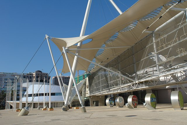 Photographer: Osvaldo Gago